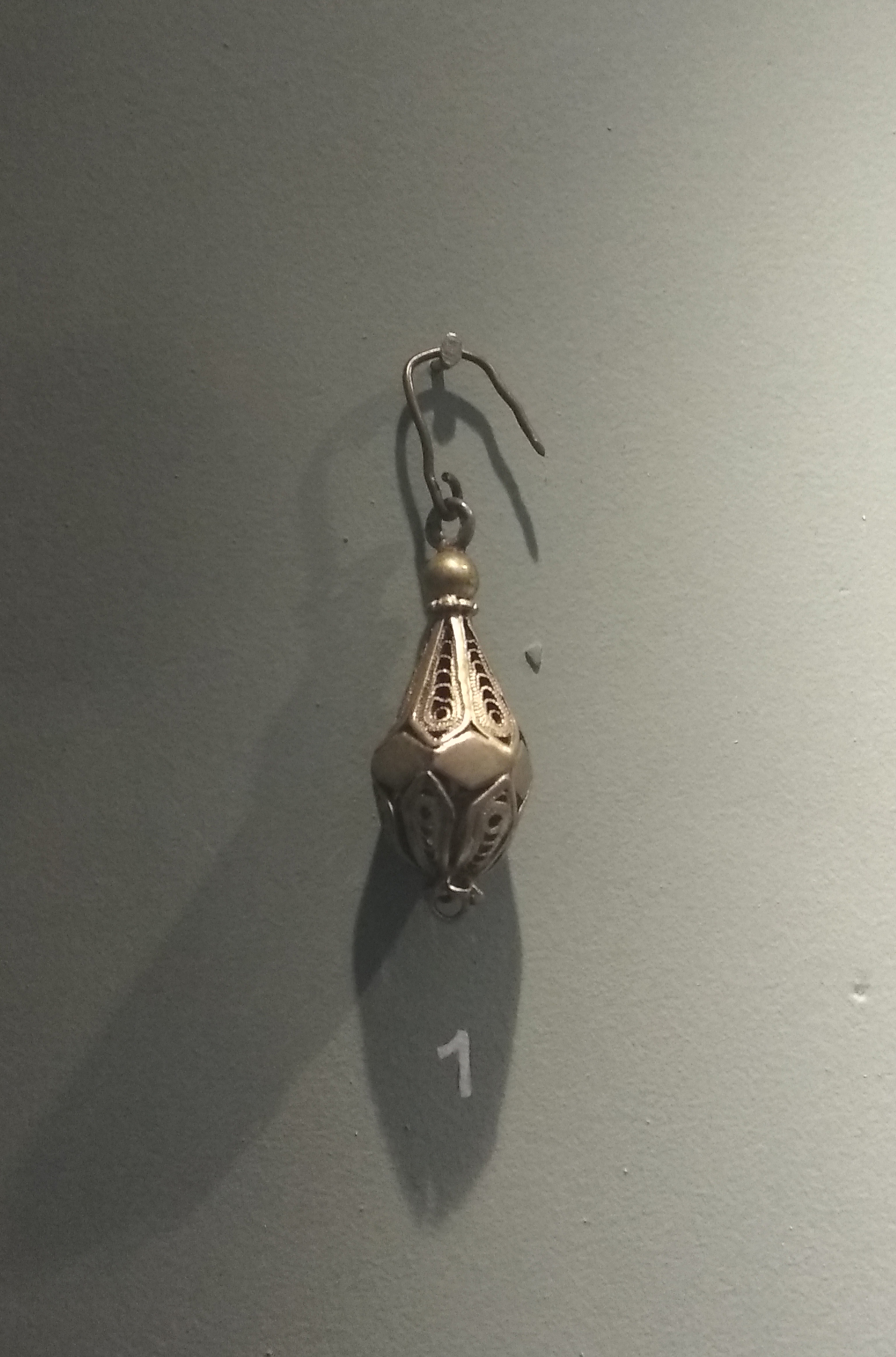 Minđuša izložena u sklopu postavke Narodnog muzeja Kruševac